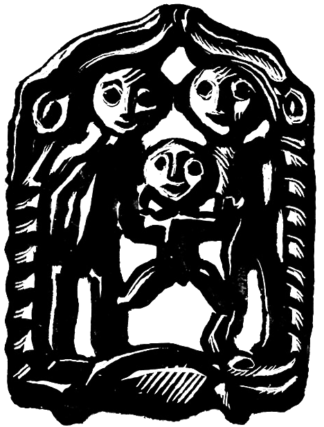 Заставка. Бляшка в Пермском зверином стиле (М. А. Курушин). Опубликовано: Газета «Мысль», Октябрь, 1991, № 2